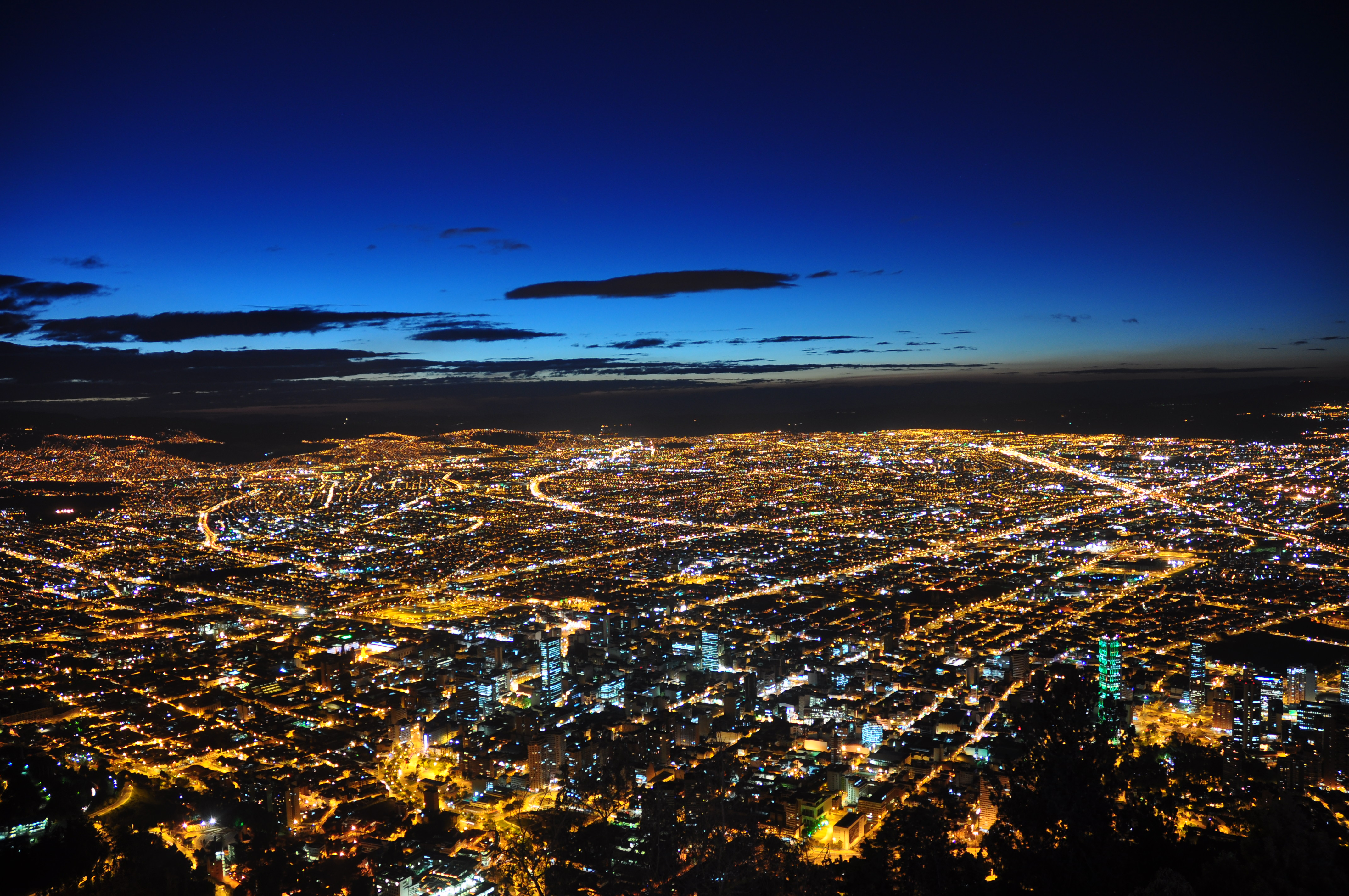 Bogotá en la noche